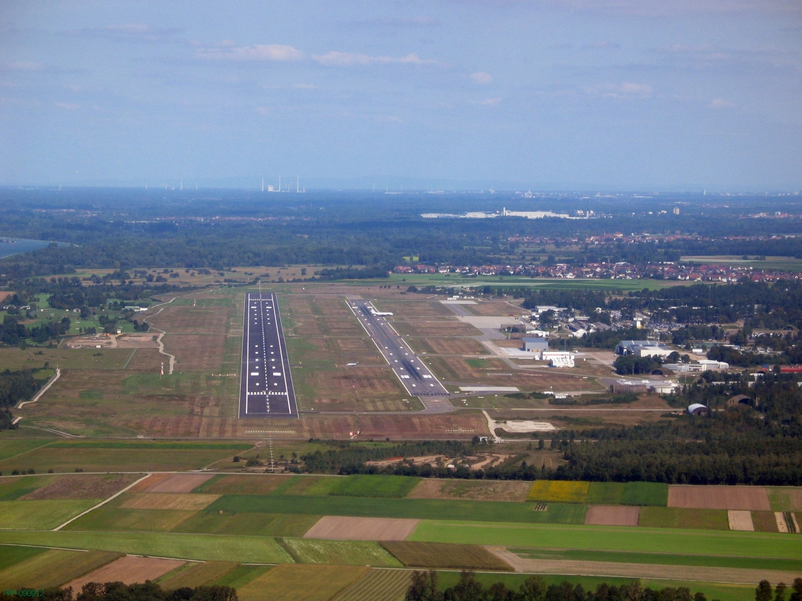 Anflug auf Piste 03 des Flughafens Karlsruhe/Baden-Baden nach Sanierung